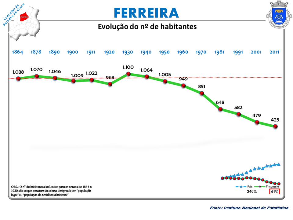 Censos 1864/2011